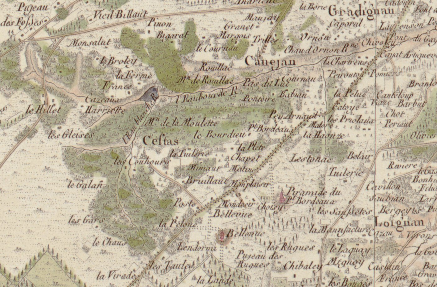 Carte de Cassini n°104 (Bordeaux, zoom sur Cestas), 1756.